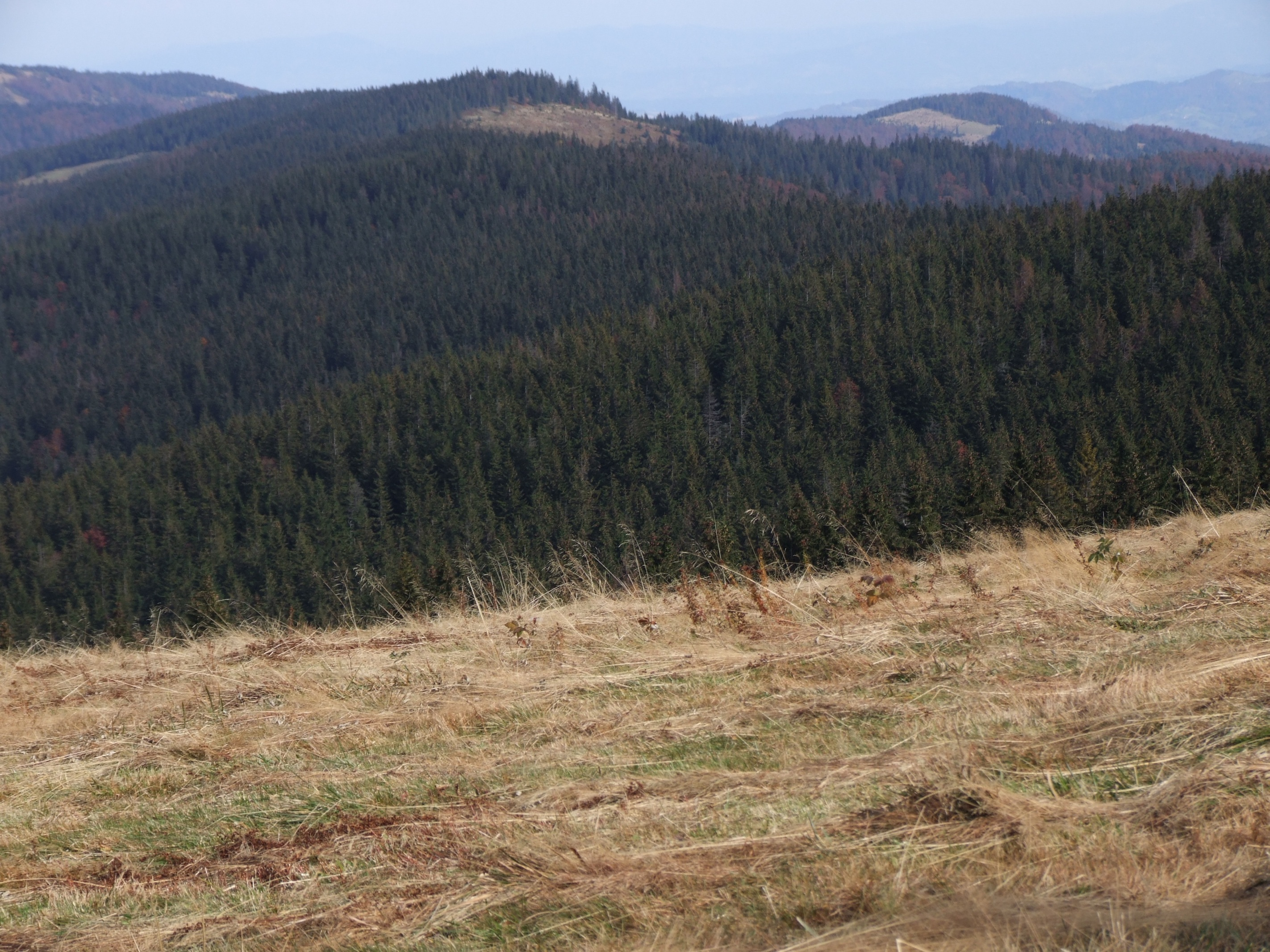 Widok z polany Jaworzyna Kamienicka. Na wprost Przysłop, po jego prawej stronie (w głębi) Jaworzynka Gorcowska (Piorunowiec)